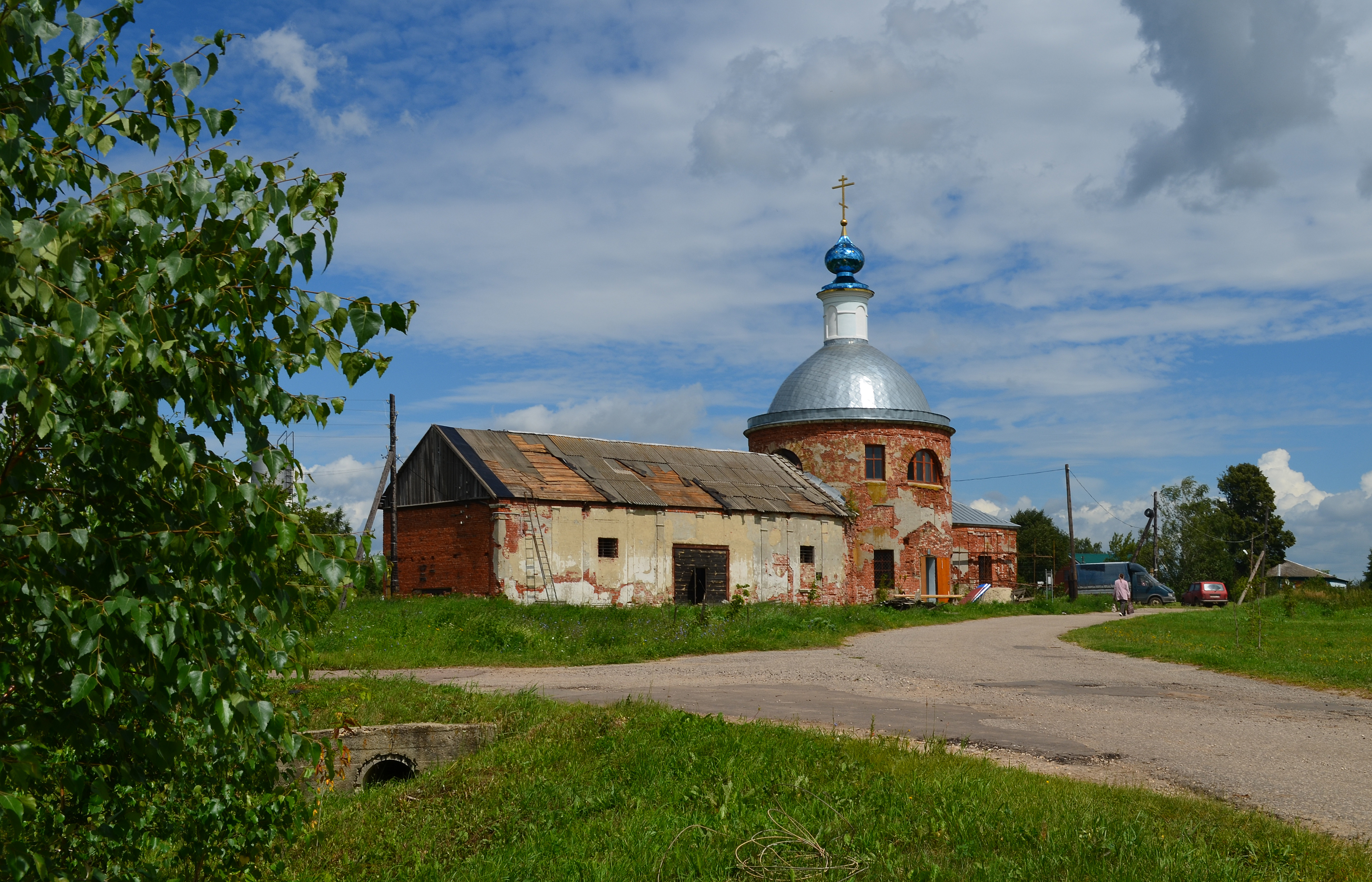 Московская область.Зарайский район.Деревня Карино.Смоленская церковь.